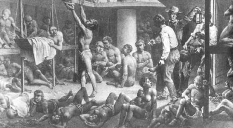 Esclavos africanos llevados a Sudamérica por los ingleses en el siglo XVIII